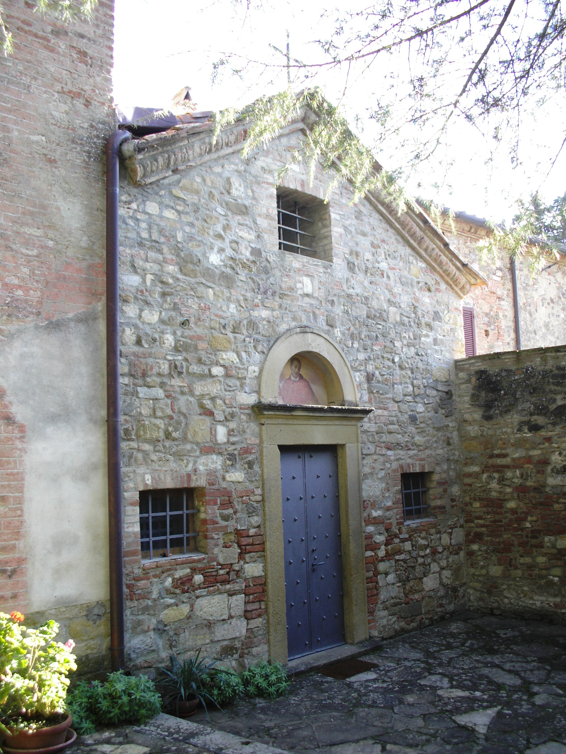 Oratorio di San Carlo Borromeo, Linari, Barberino Val d'Elsa (Firenze)